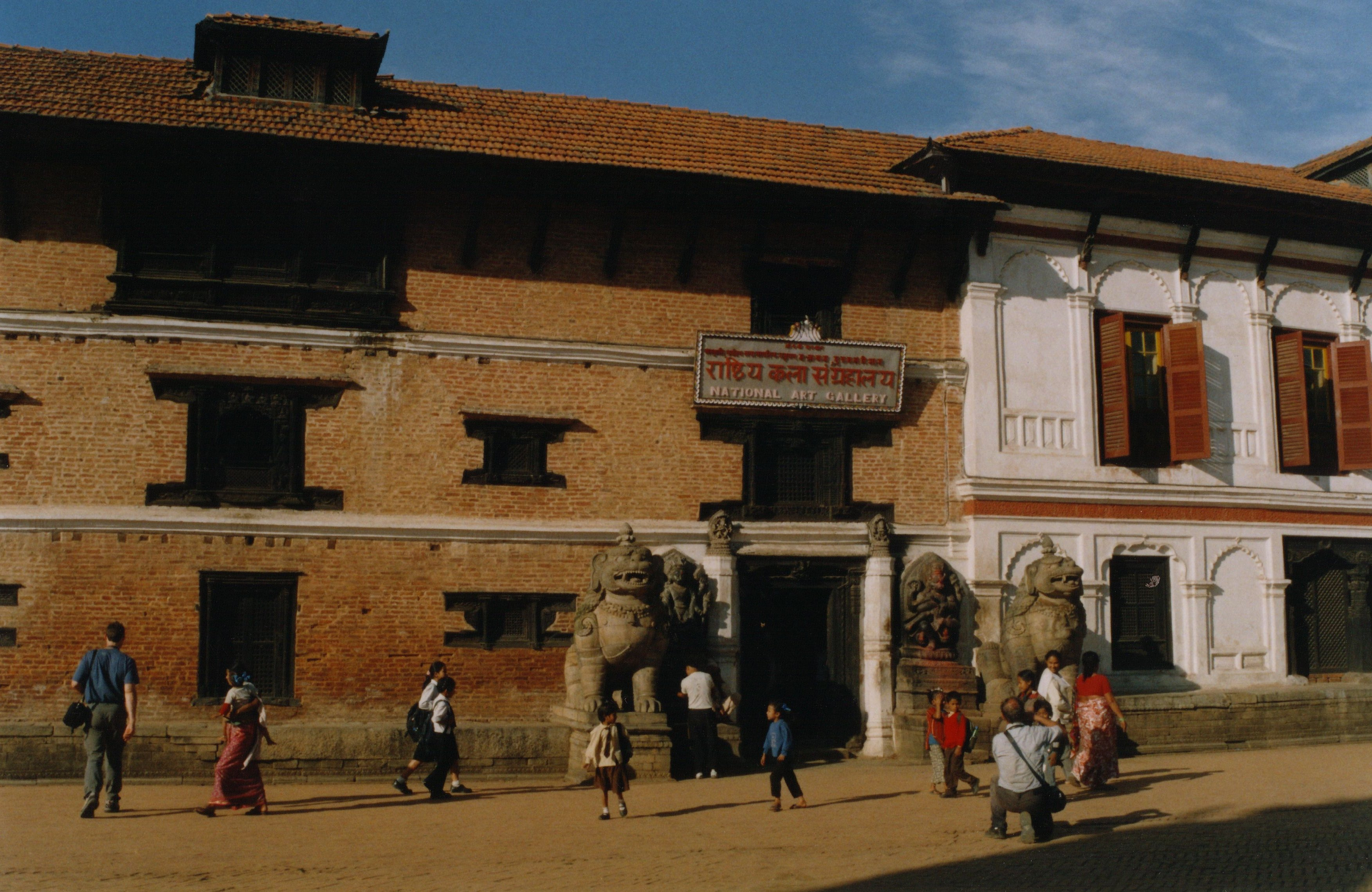 Kings Palace Bhaktapur (Nepal)